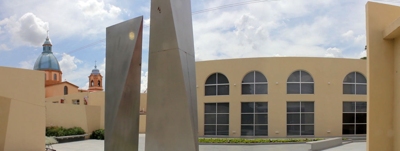 Panoramica del Paseo Contador Juan Alberto Audicio